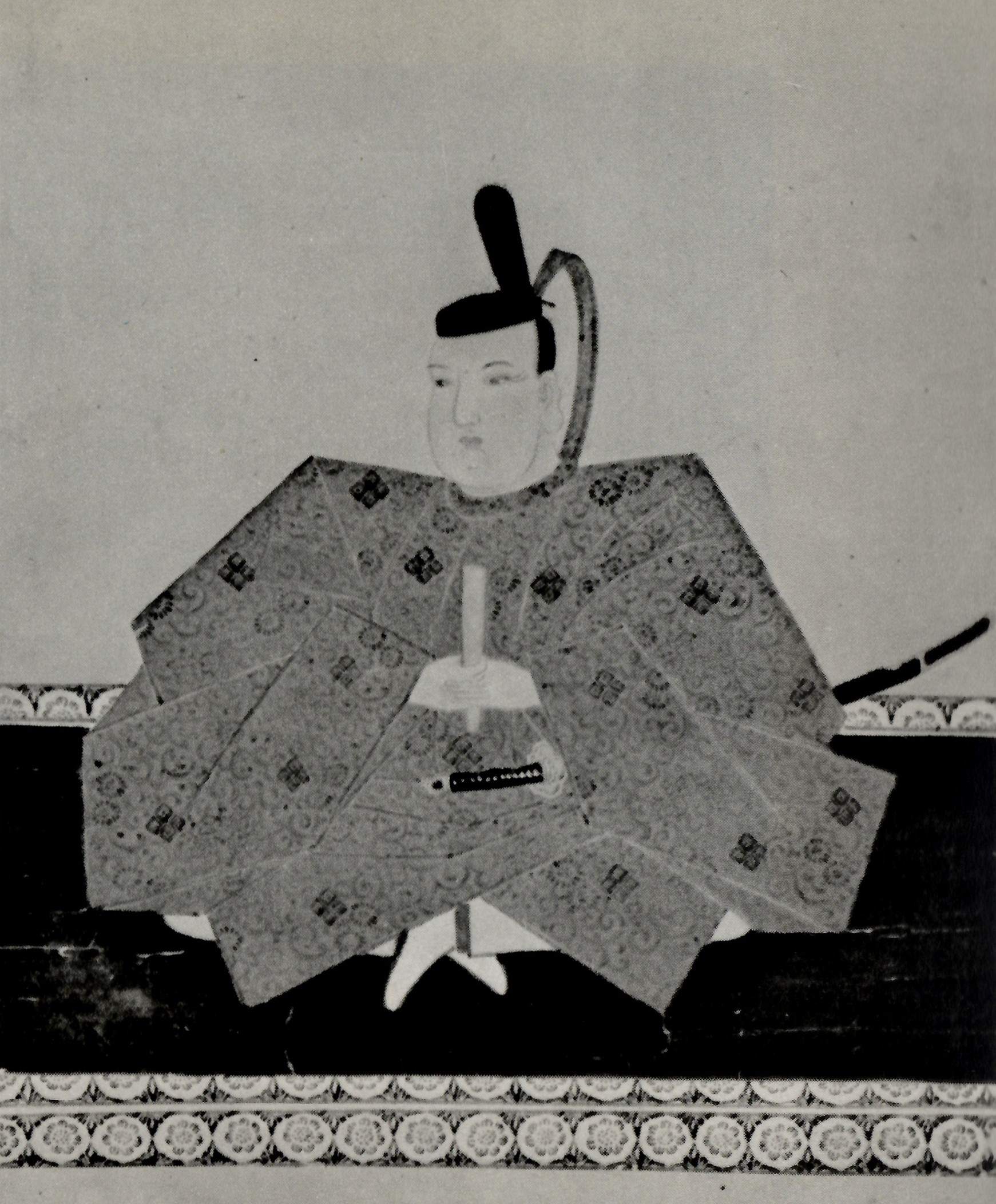 豊岡藩主京極高行の肖像(モノクロ)。